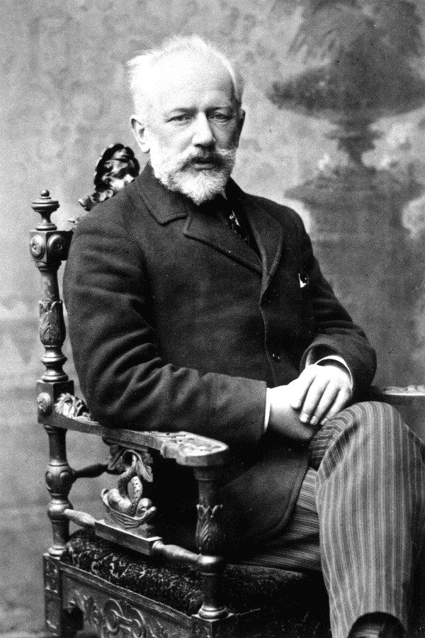 Ritratto di Čajkovskij a Odessa, inverno 1893